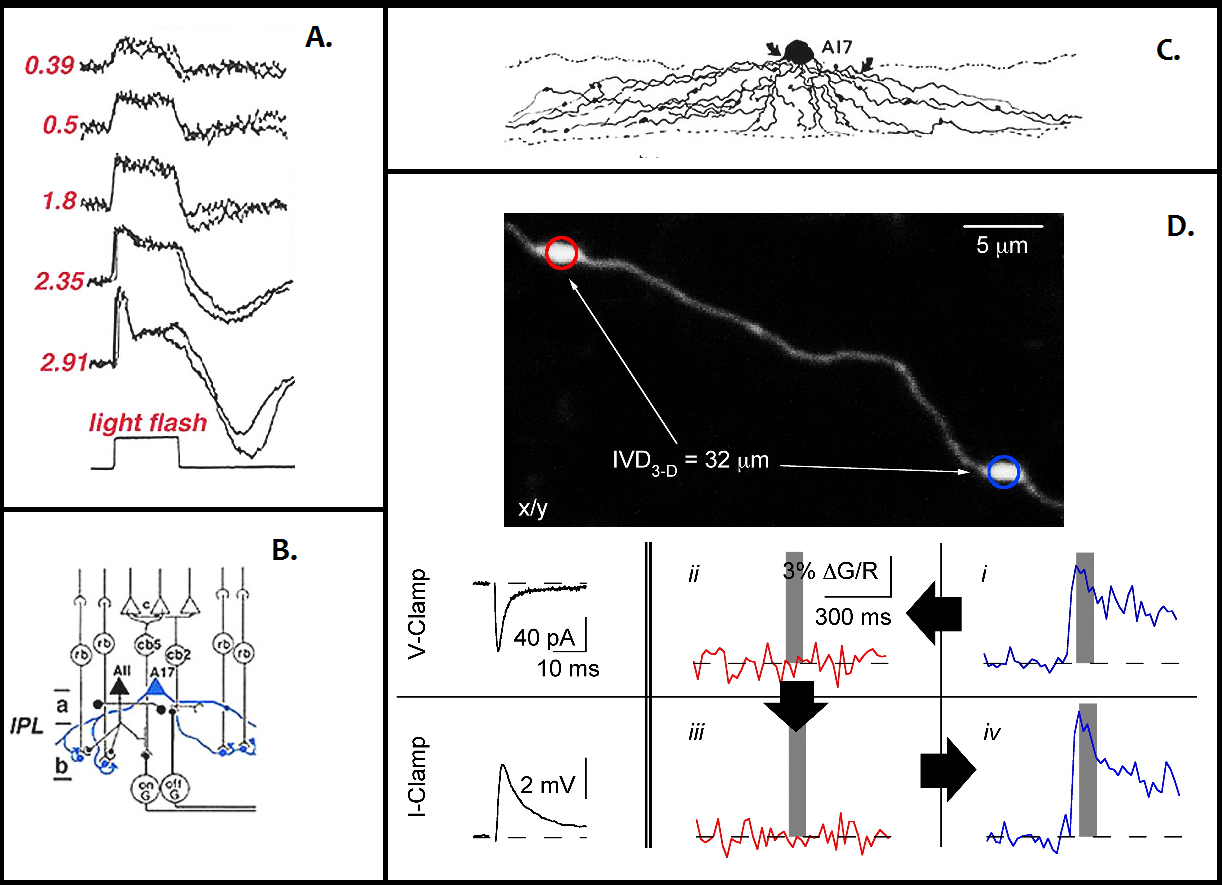 Морфологія, фізіологія, зв'язки з іншими клітинами сітківки, компартметна ізоляція функцій. Image "D" adapted and modified from